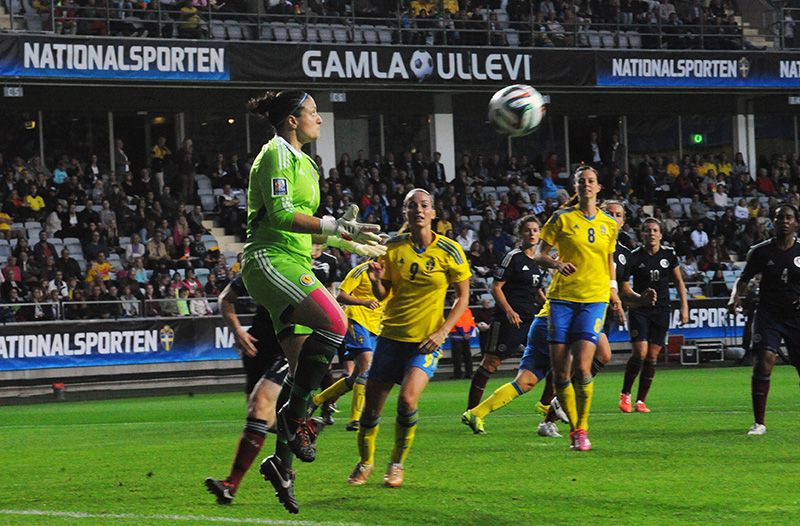 a_73_1862